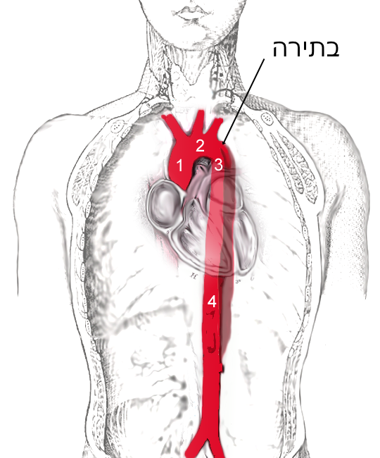 תרשים המתאר את מצב בתירת אבי העורקים. מתורגם מאנגלית.